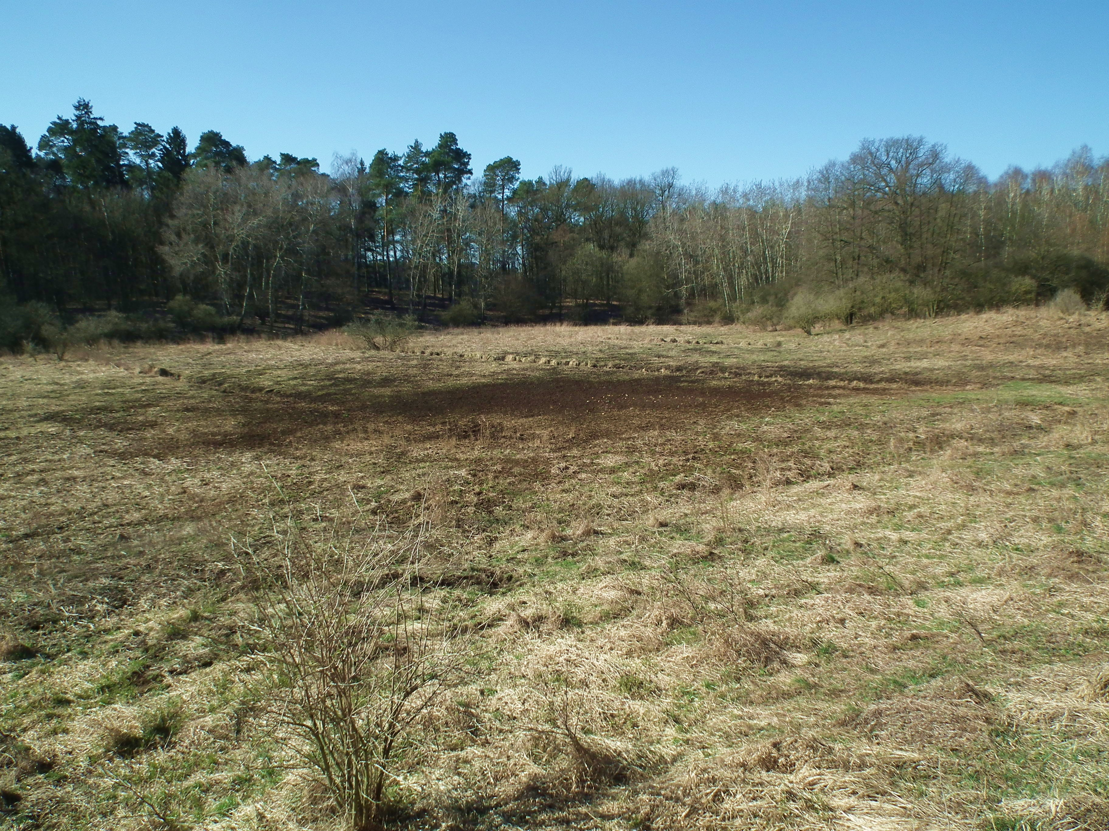 Dolina Kanału Szkutelniak na płn. od Starej Górki.